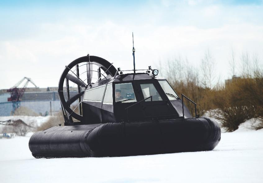 Катер Мираж-7